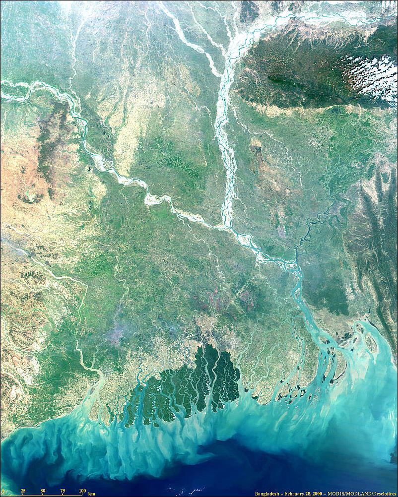 Bangladesh